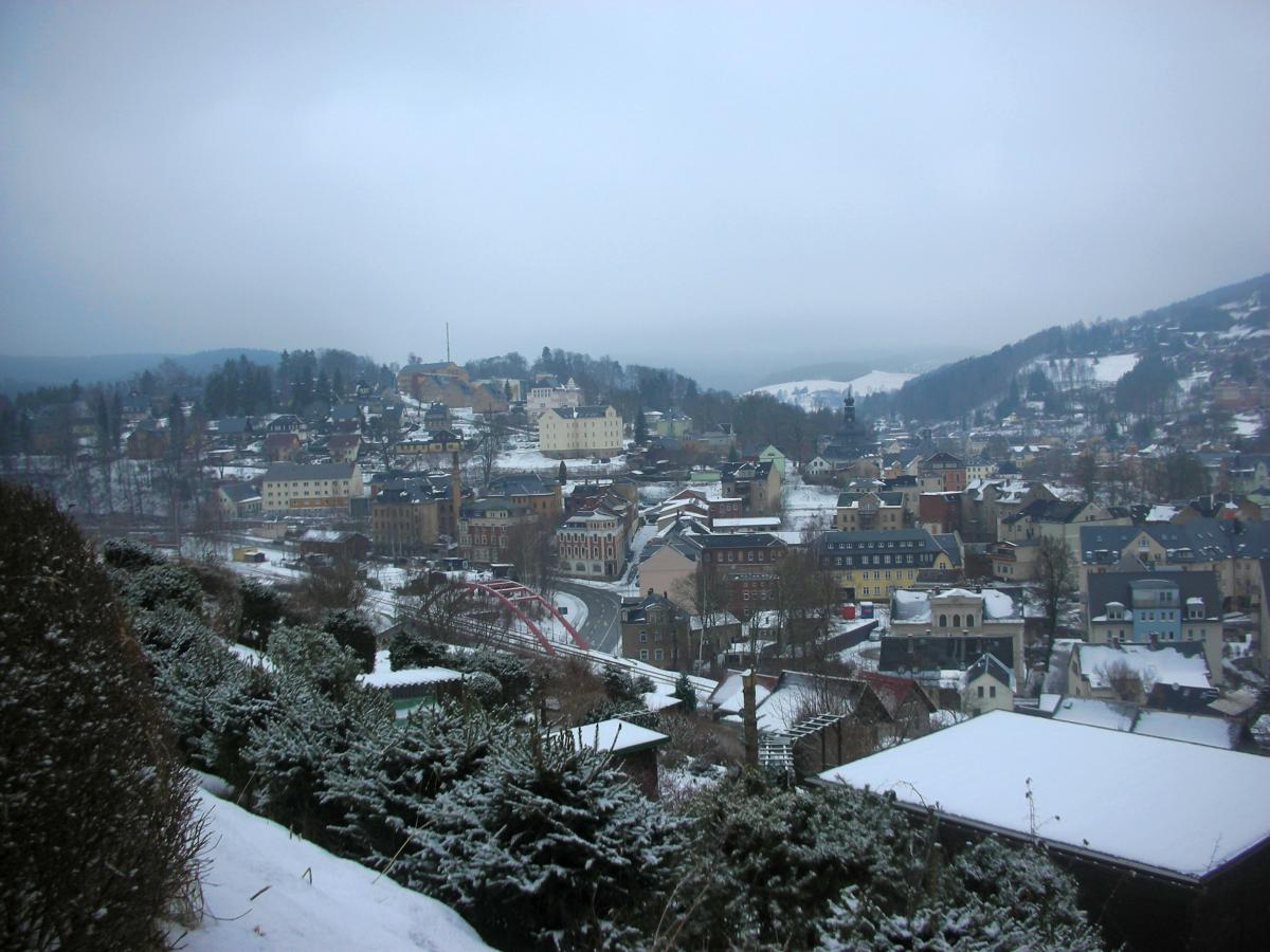 Blick aufs Zentrum von Klingenthal